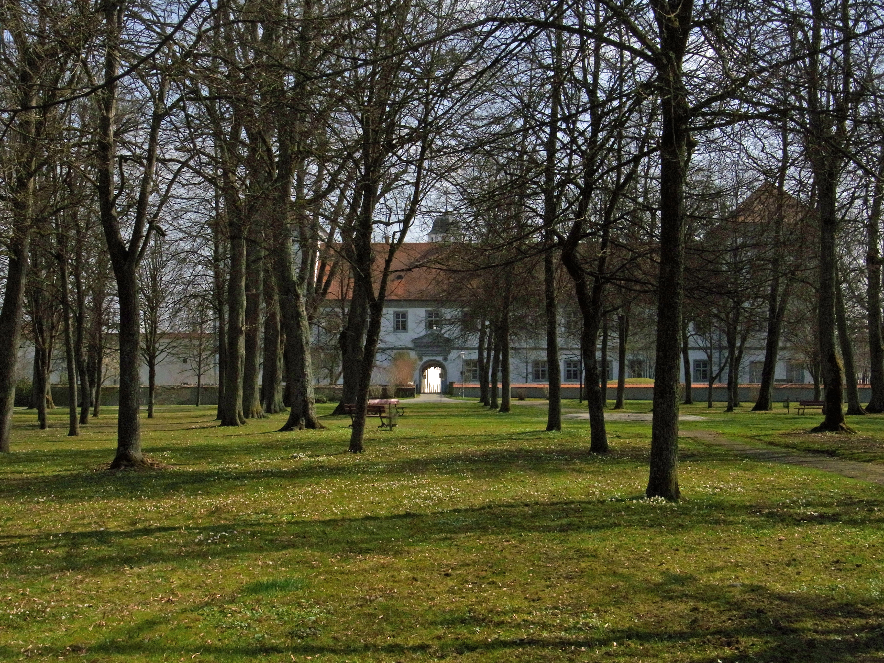 Schloss Meßkirch Hofgarten